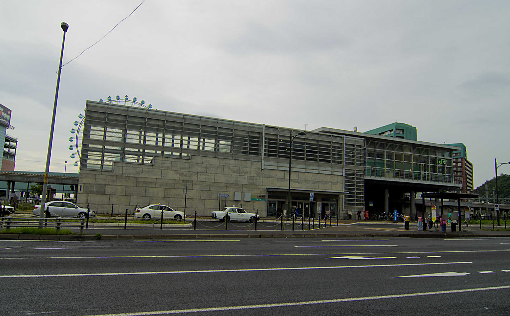 北海道旅客鉄道株式会社函館本線小樽築港駅